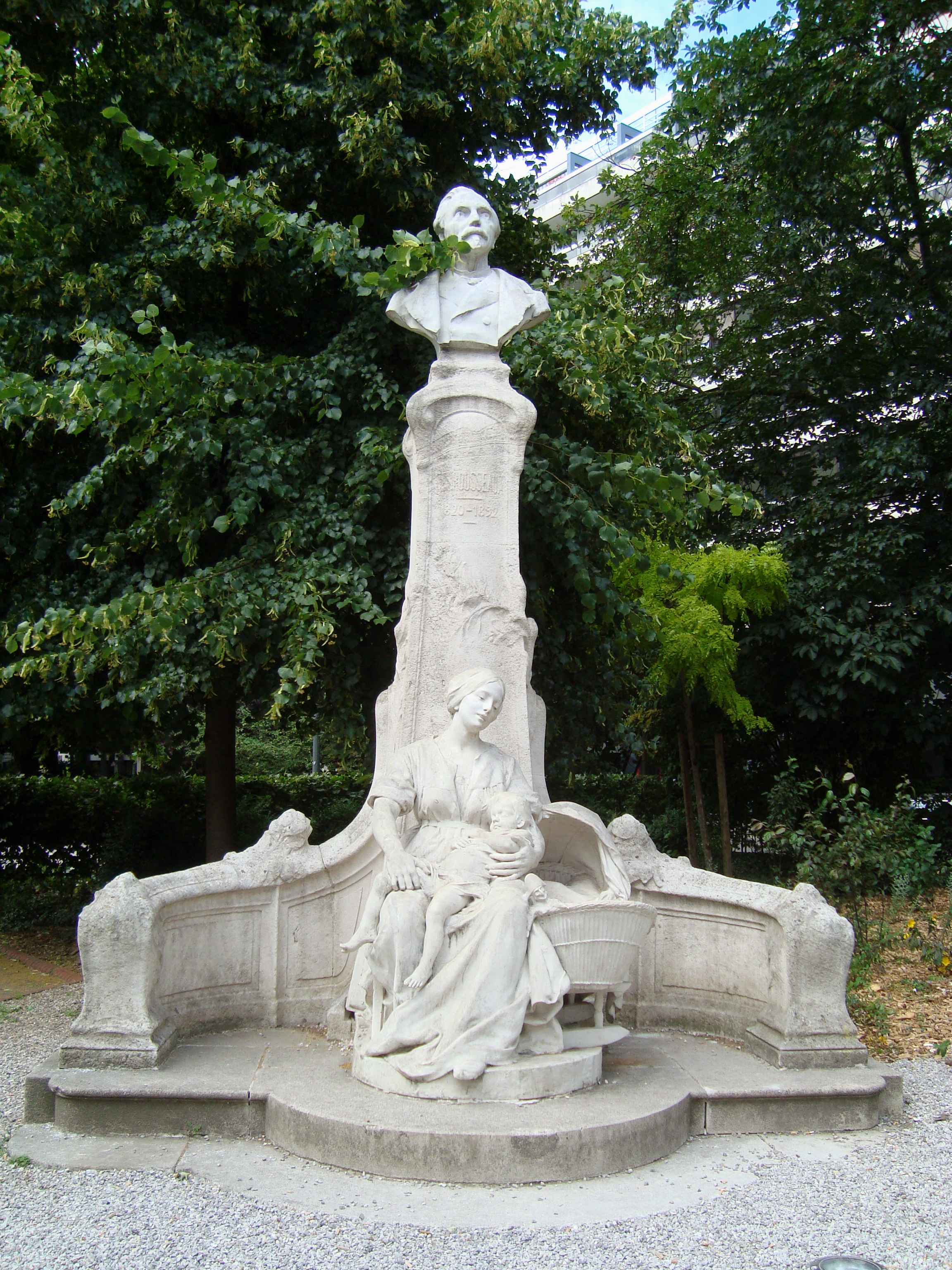 Statue du P'tit Quinquin à Lille